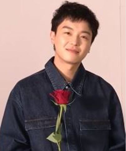 몽골의 연인으로 변신한 안소희와 연우진을 만날 수 있는 단편영화 '아노와호이가' 가 3월 8일 세계 여성의 날 랑콤 유투브 채널에서 공개됩니다. 마리끌레르 4월호 화보에서도 만날 수 있으니 기대해주세요!